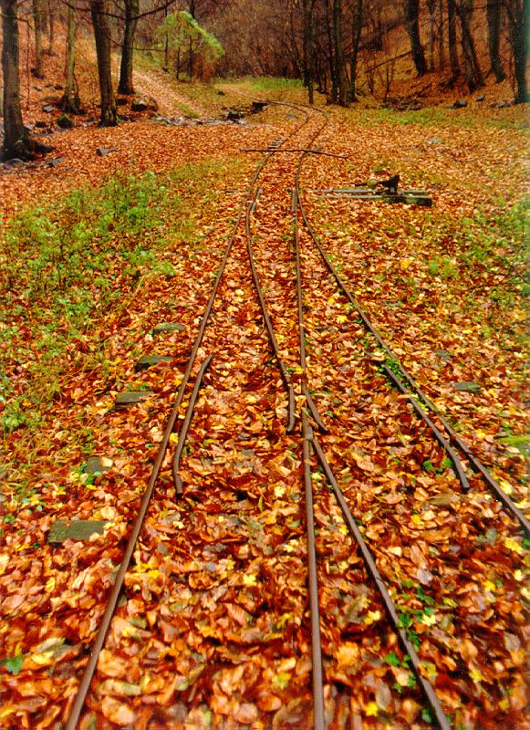 Kemencei Erdei Múzeumvasút, Hajagos állomás, 1991-ben, még az árvíz előtt.